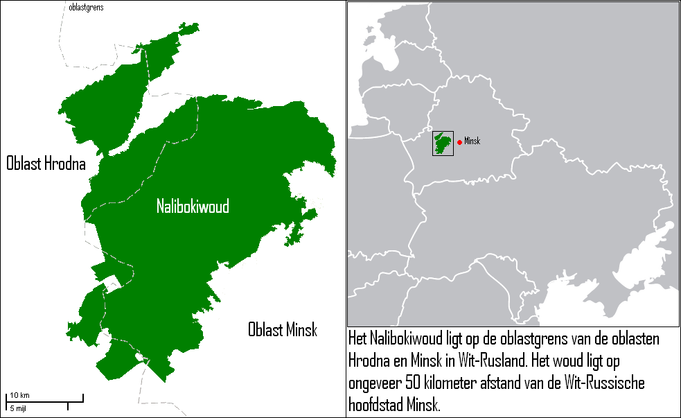 Locatie van het Nalibokiwoud in Wit-Rusland